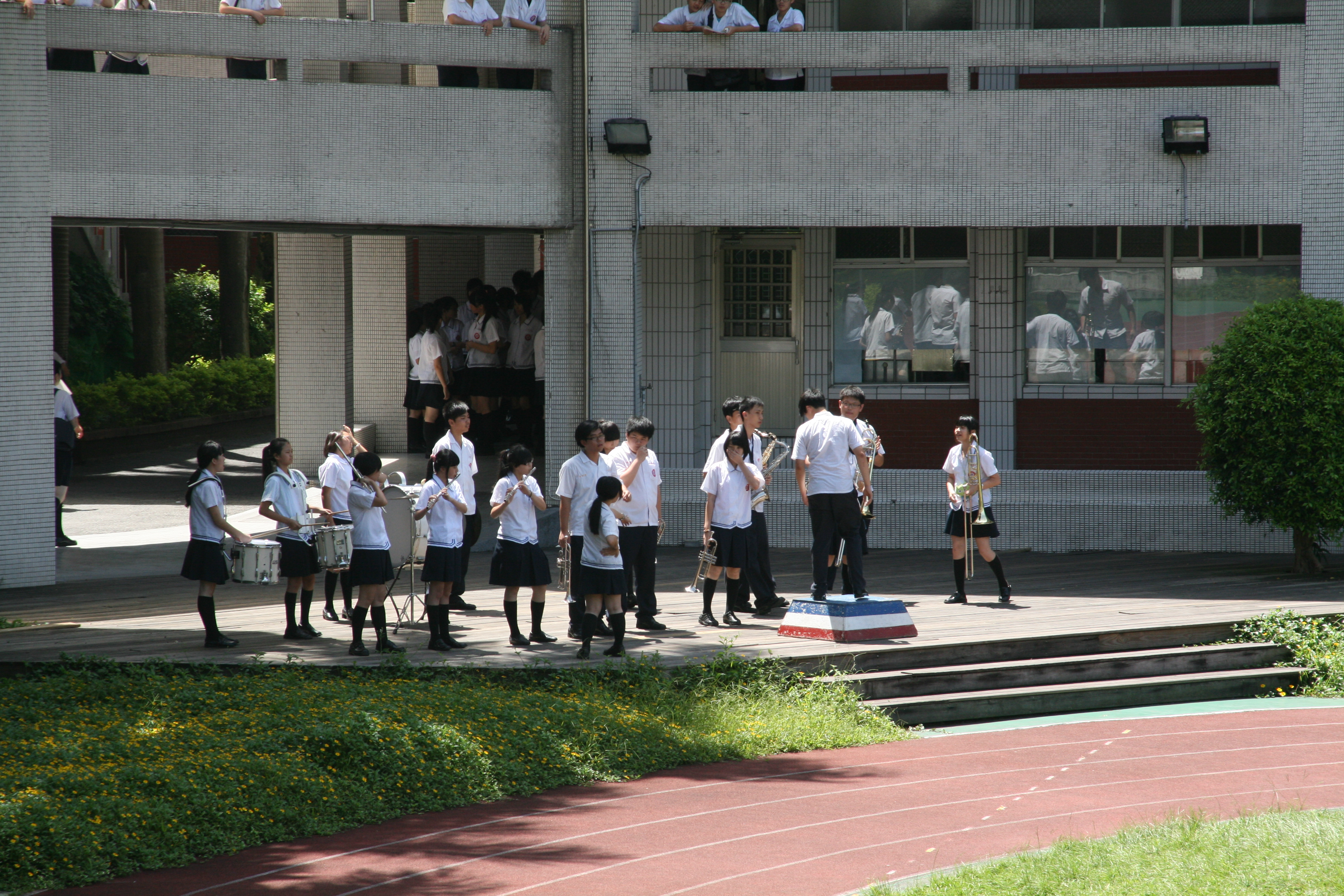 中文（台灣）: 滬江高中南方松廣場，滬江高中樂隊準備演奏中華民國國歌。